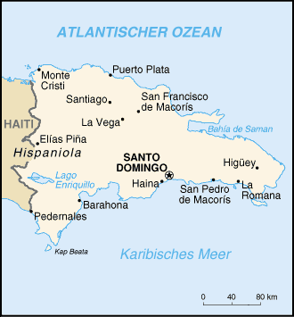 Karte der Dominikanischen Republik